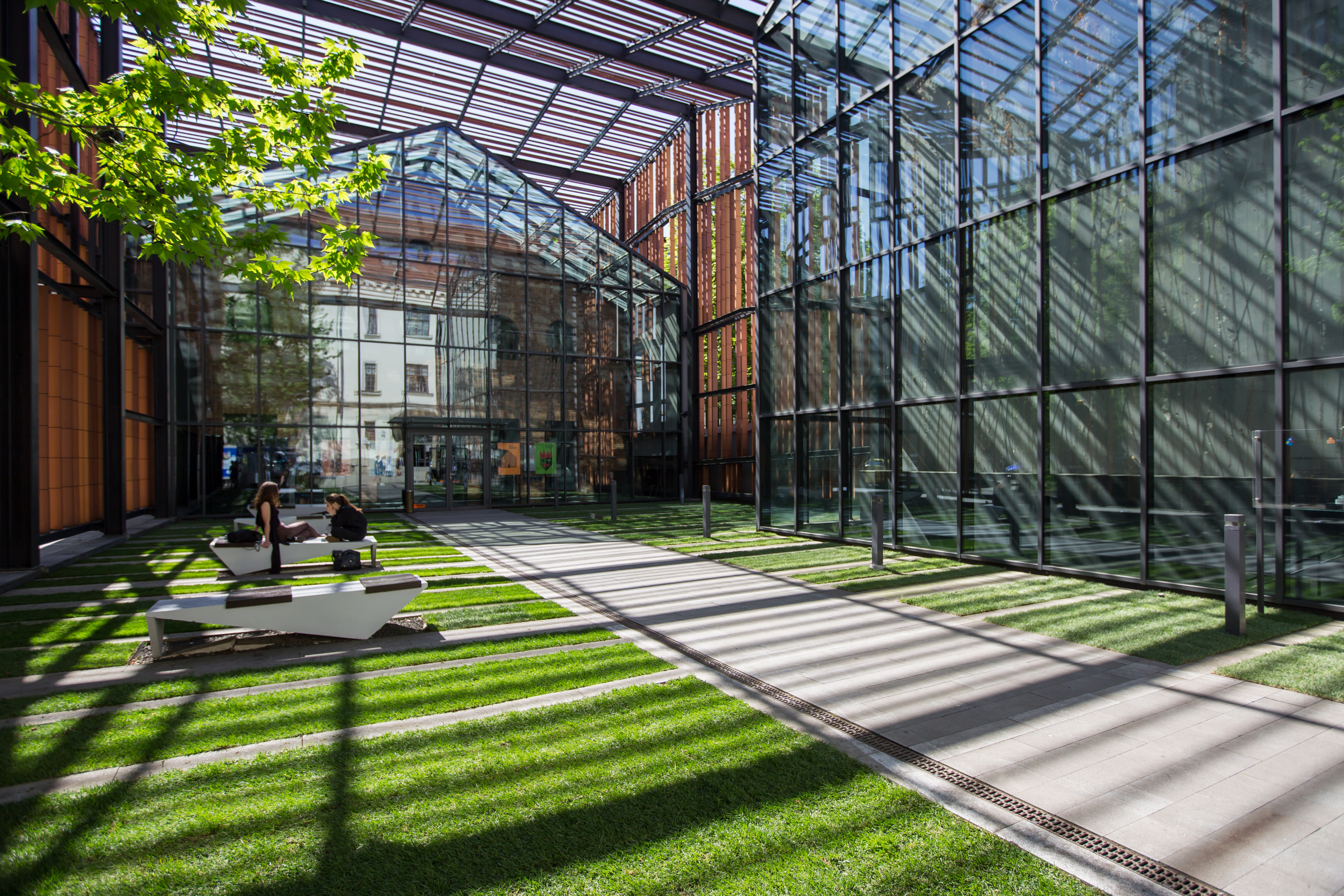 Małopolski Ogród Sztuki